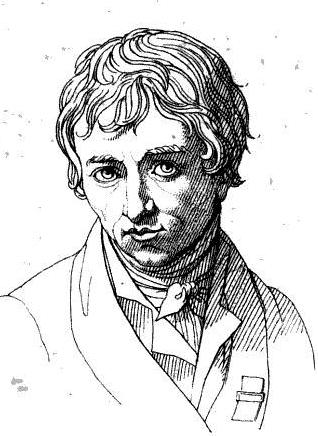 Antoine-Denis Chaudet.